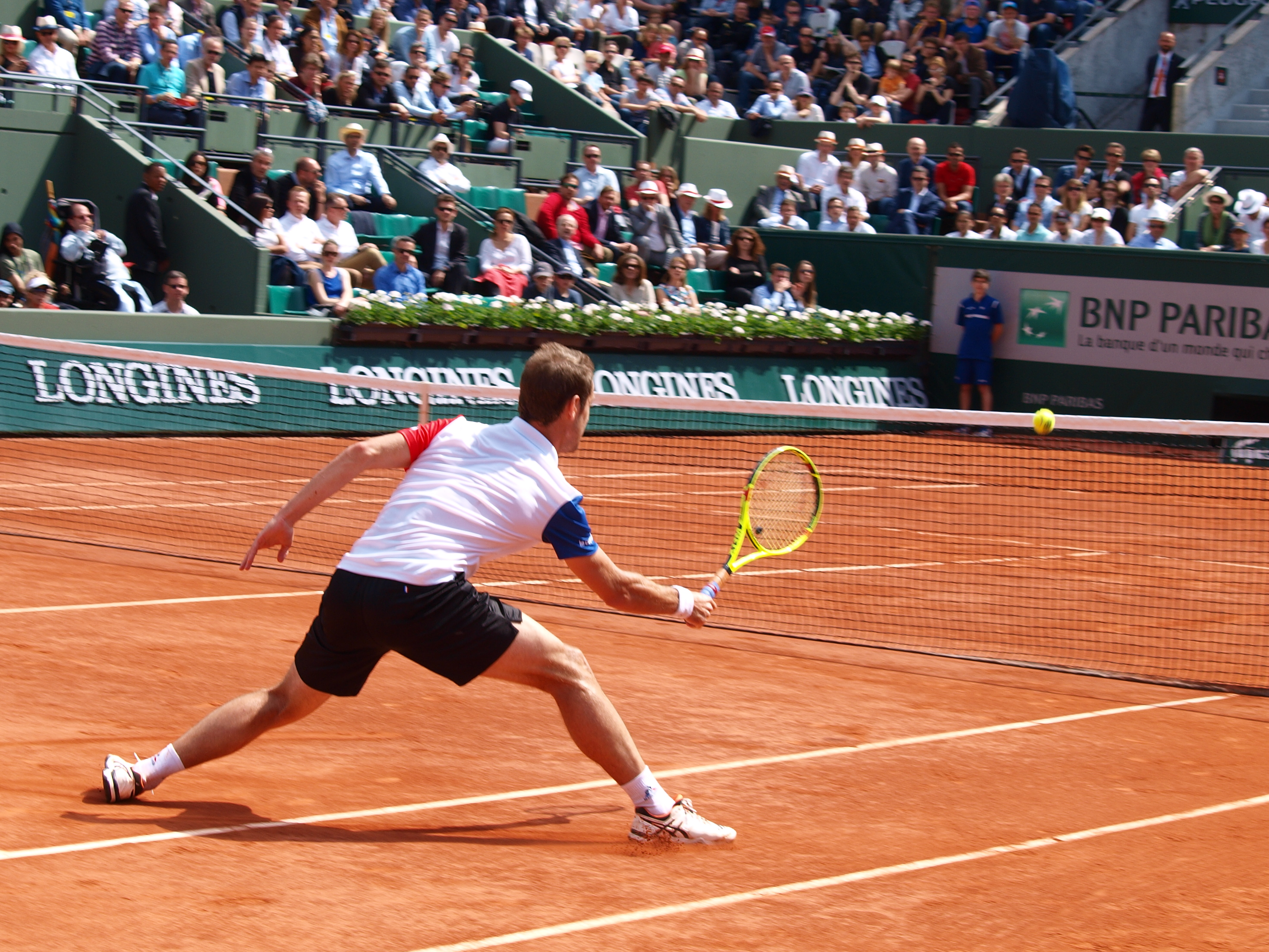 Le joueur de tennis français Richard Gasquet, lors des internationaux de France de tennis, sur le stade Roland-Garros, à Paris, le 25 mai 2016, dans son duel sportif contre le joueur américain Bjorn Fratangelo.